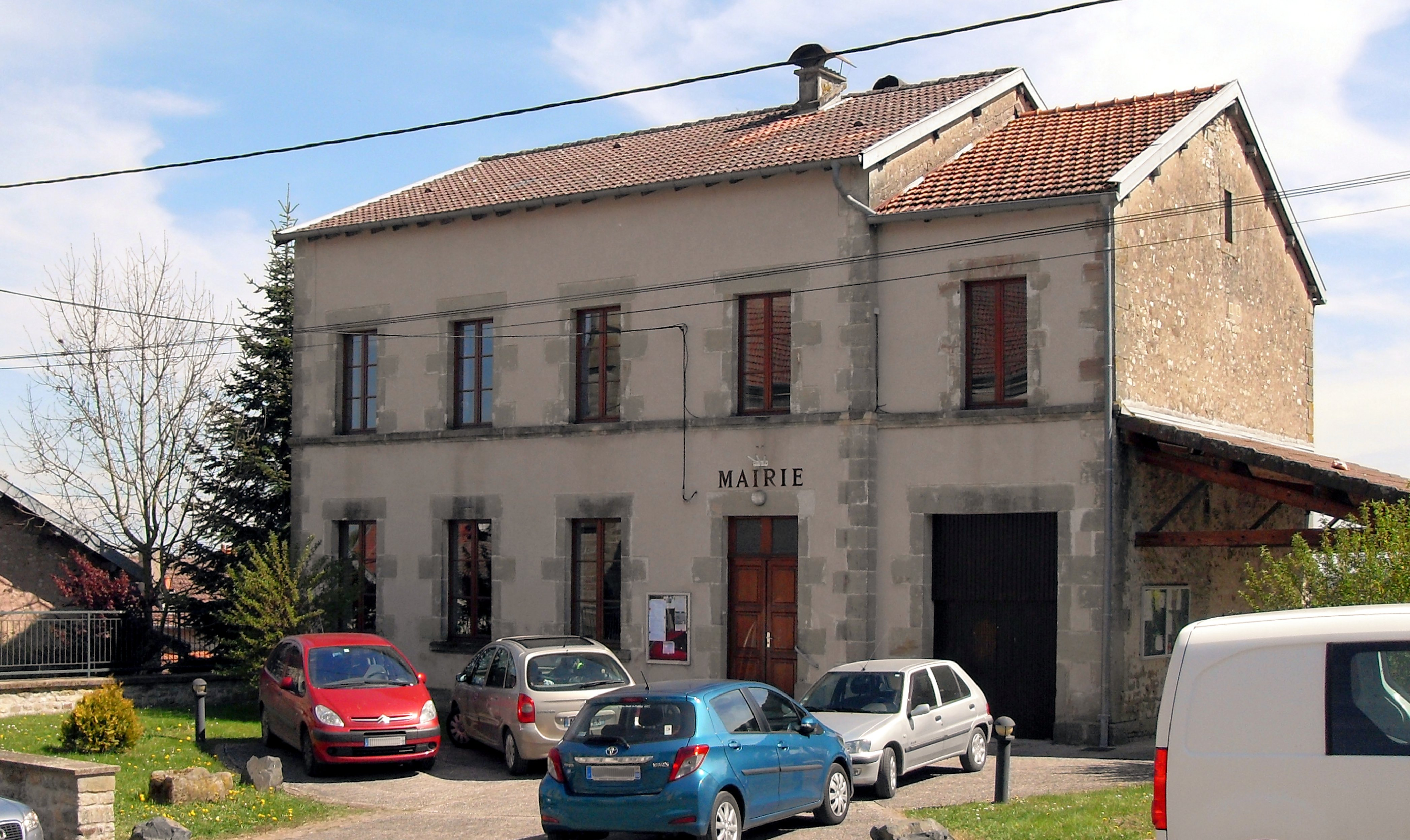 La mairie de Mont-lès-Lamarche